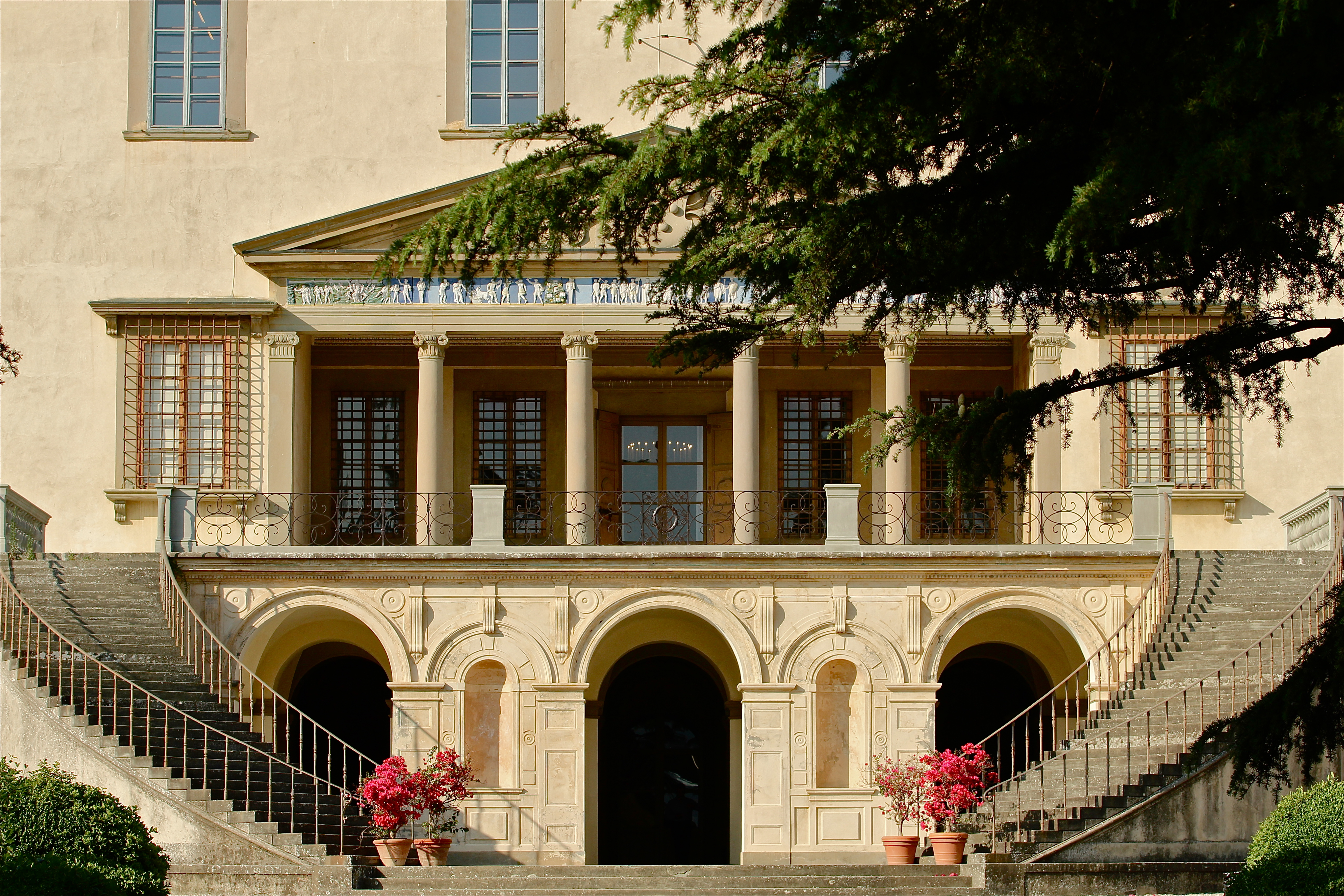 Villa medicea di Poggio a Caiano - MIBAC -vista frontale This is a photo of a monument which is part of cultural heritage of Italy.